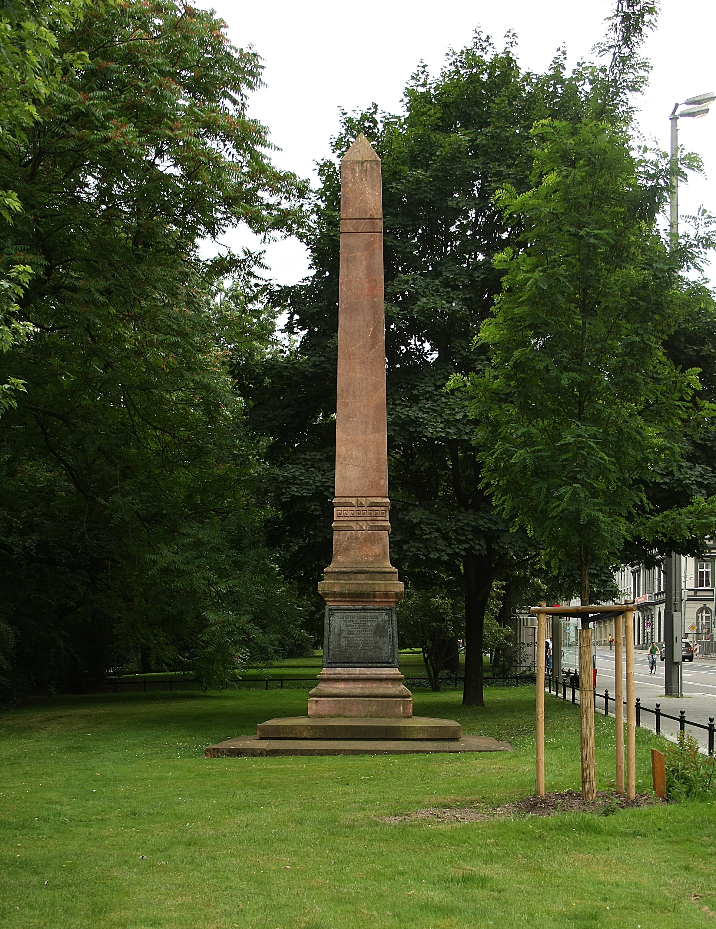 Eisenbahn-Obelisk an der Goethestraße in Leipzig